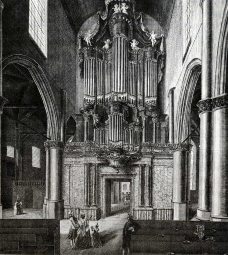 Moreau-orgel in de Sint Janskerk te Gouda